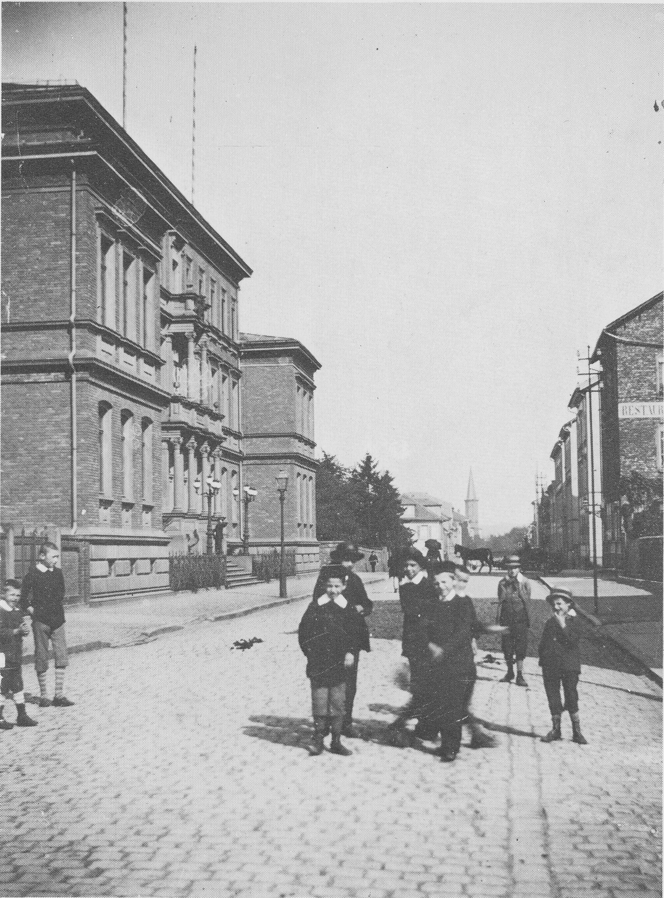 Offenbach Kaiserstrasse mit Gericht, Blick nach Norden Datum